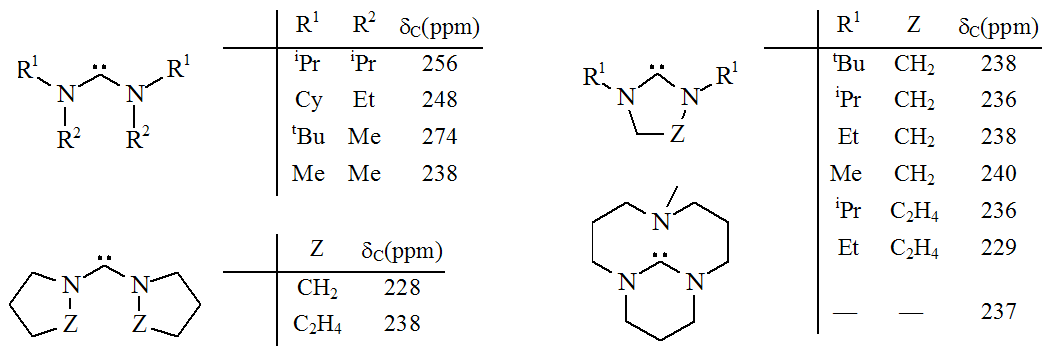 Diaminocarbenes